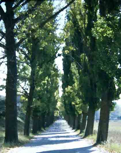 Alcalá de la Selva (Teruel), vista de la entrada a la población. Fotografía tomada en los años 80.